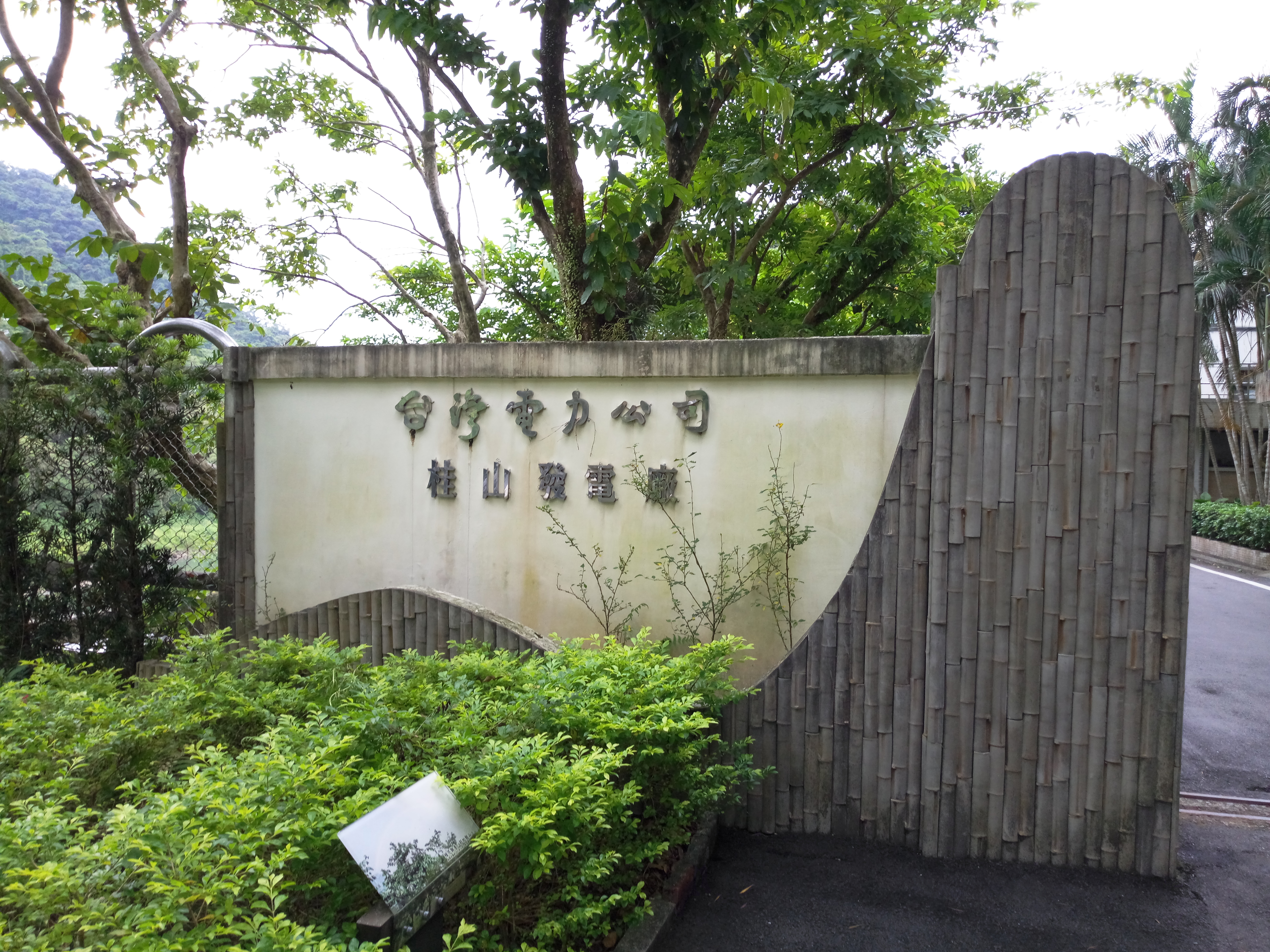 桂山發電廠大門